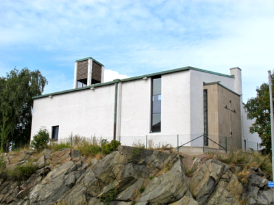 Guldhedskyrkan i Guldheden i Göteborg